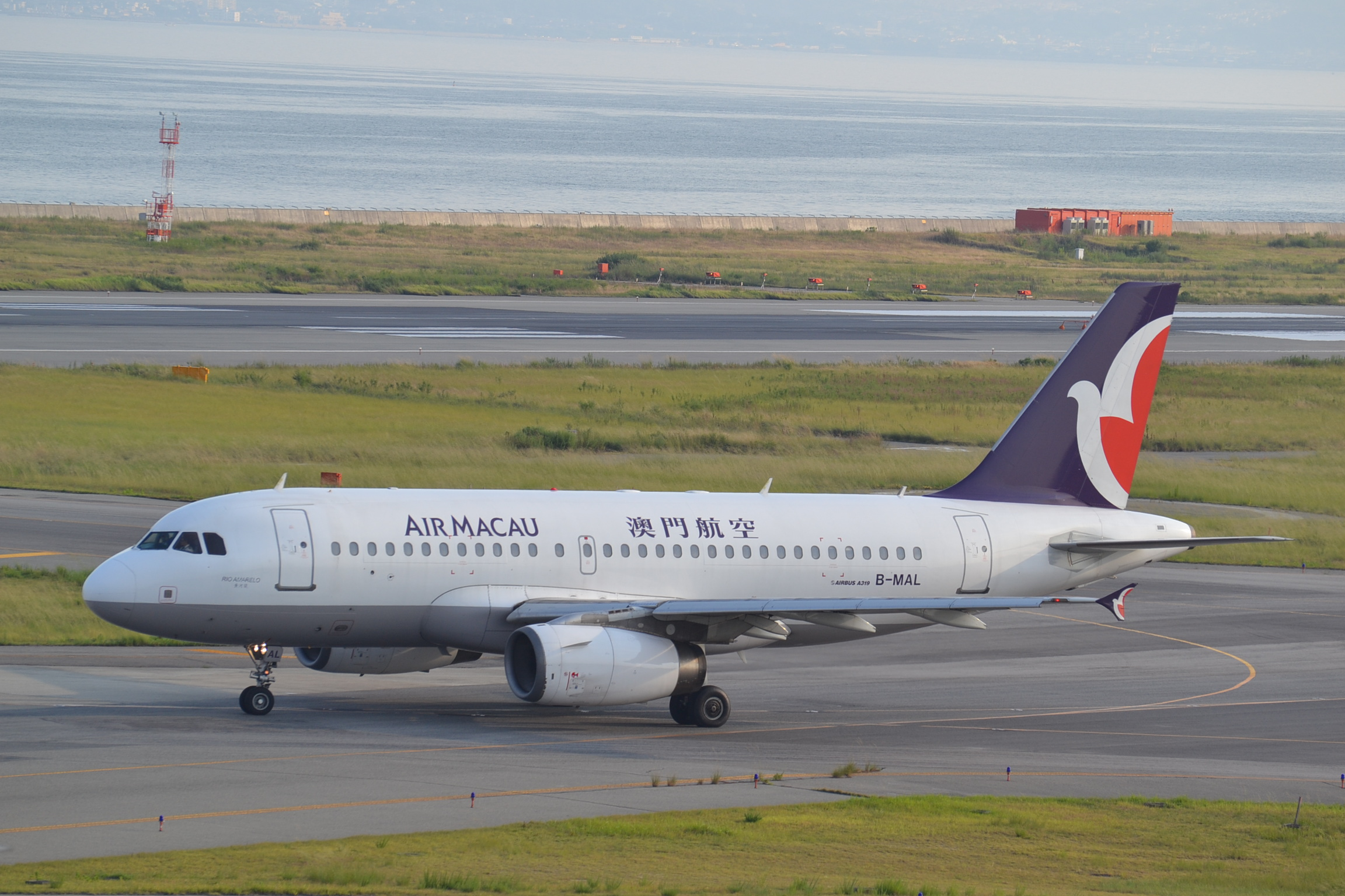 Airbus A319 of Air Macau at Osaka Kansai-KIX,Japan,28/08/13.